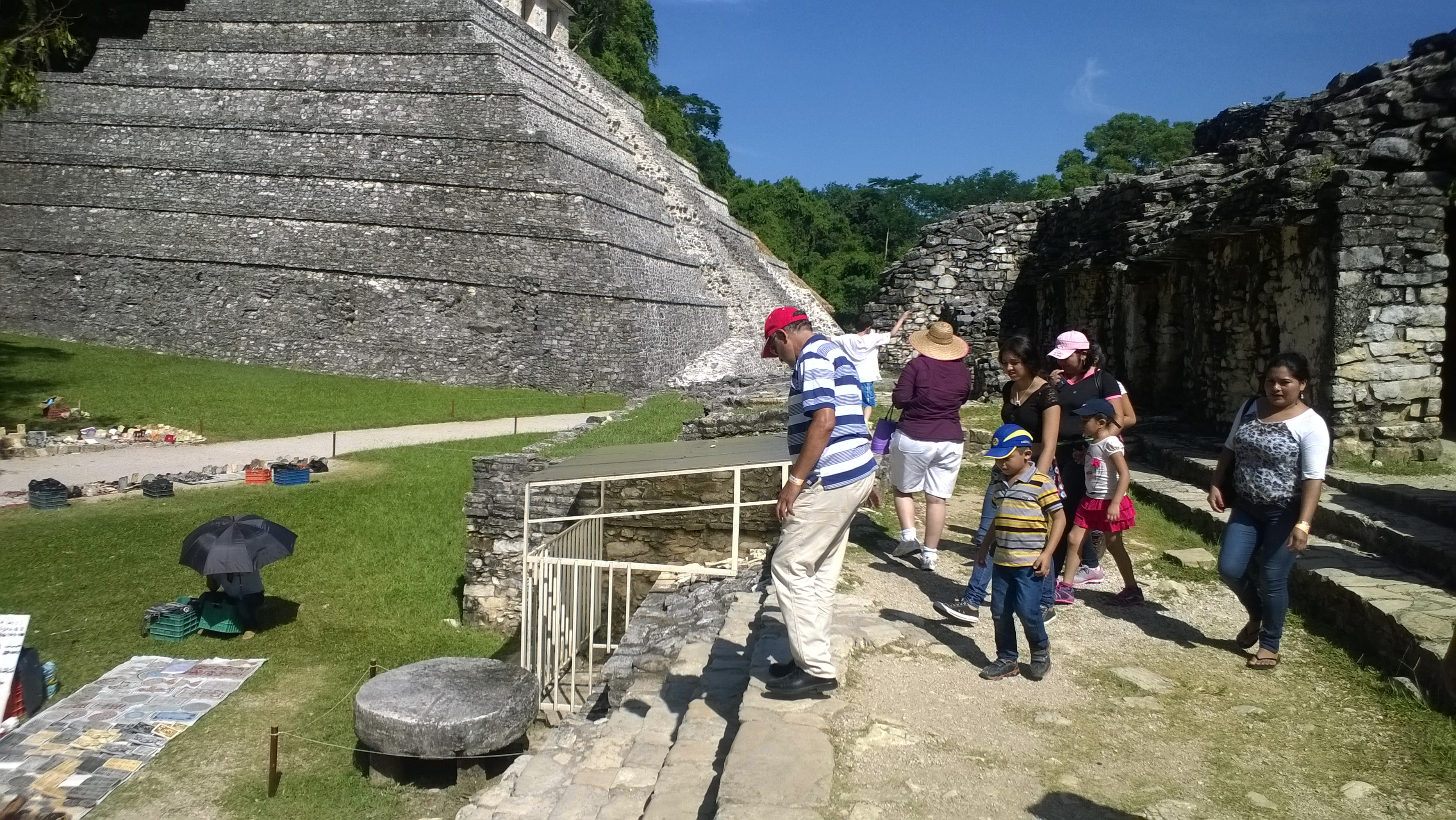 Palenque